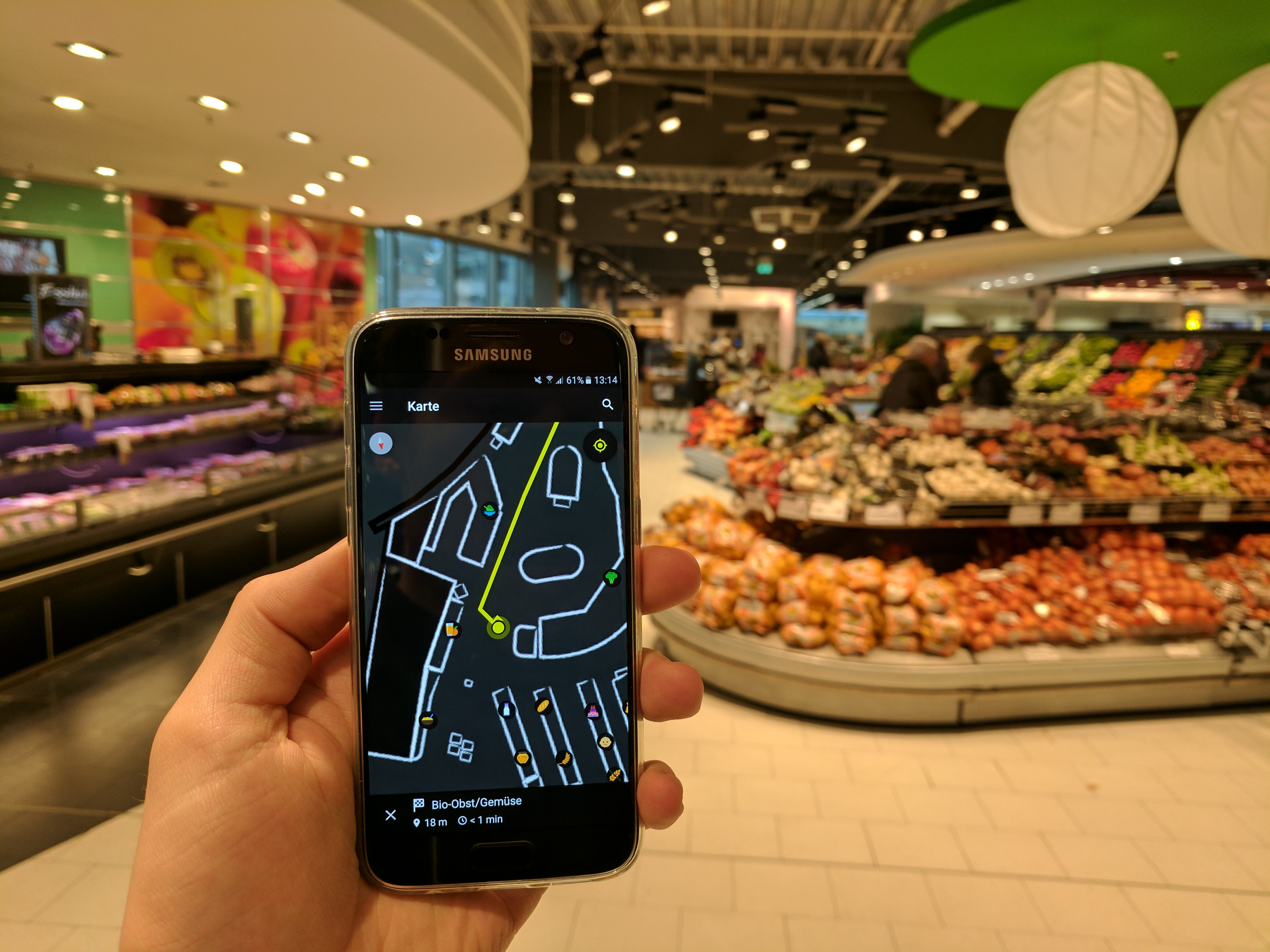 Shopping App von Favendo mit Indoornavigation auf Lichtbasis im Einsatz bei EDEKA Paschmann in Düsseldorf.